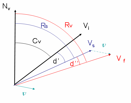 calcul route vraie